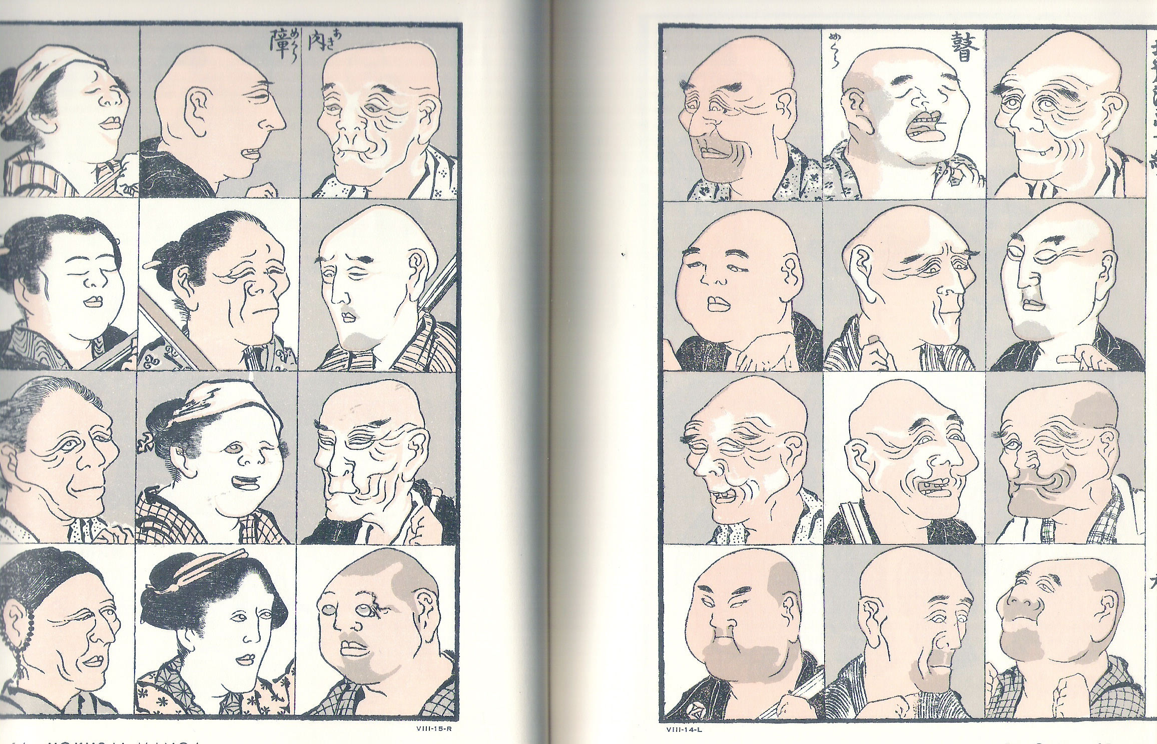 A page from Hokusai Manga